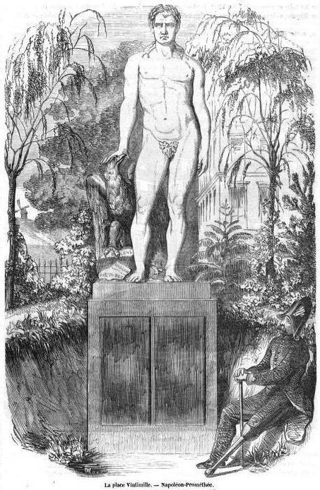 Napoléon-Prométhée, statue en marbre de 2,20 m, par Mathieu-Meusnier, pour le square Sainte-Hélène (auj. square Hector-Berlioz) à Paris (9e arr.).